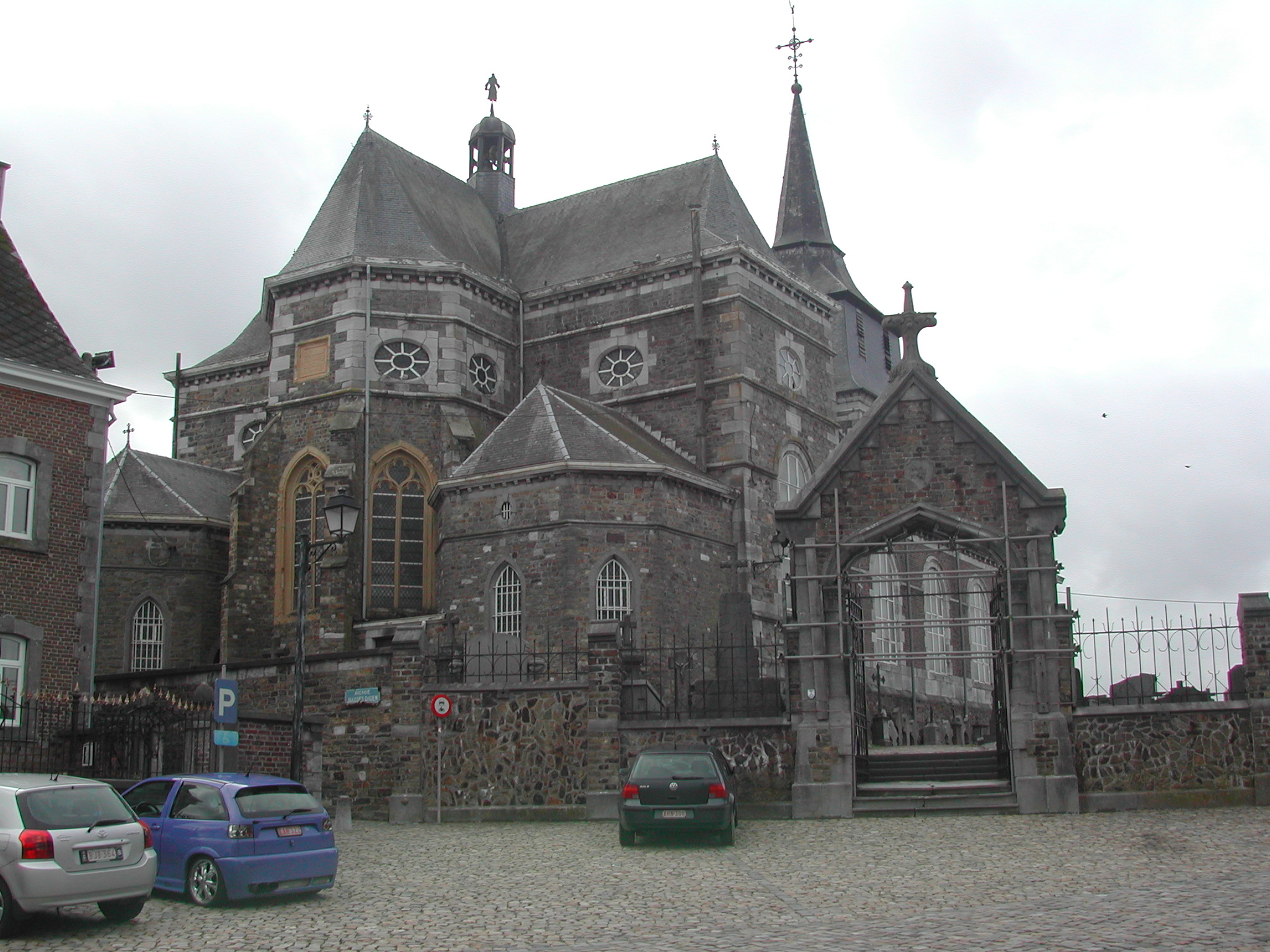 Clermont-sur-Berwinne (Thimister-Clermont), Kirche “Jakob der Ältere”